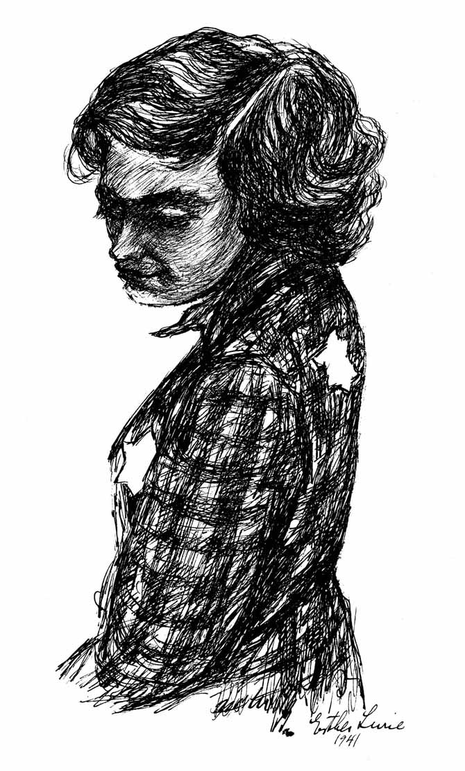 אסתר לוריא הייתה ציירת עטורת פרסים ומעצבת במה ותפאורה. זכתה פעמיים בפרס דיזנגוף. רישום "נערה בטלאי הצהוב" שיצרה בגטו קובנה